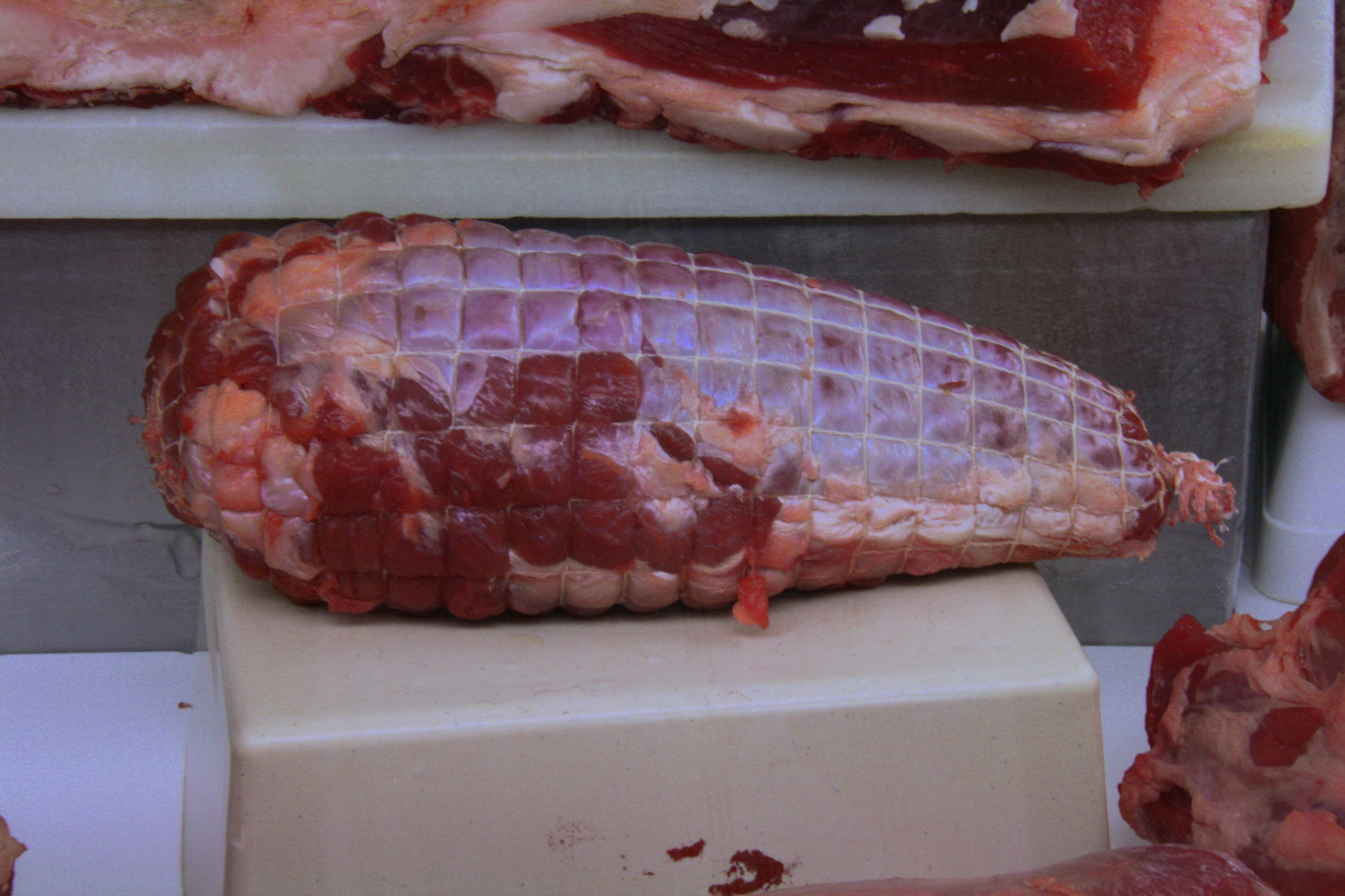 Roastbeef - Rindfleisch Redondo Teil vom Rindfleisch, das geschnitten nahezu zylindrisch ist im Netz